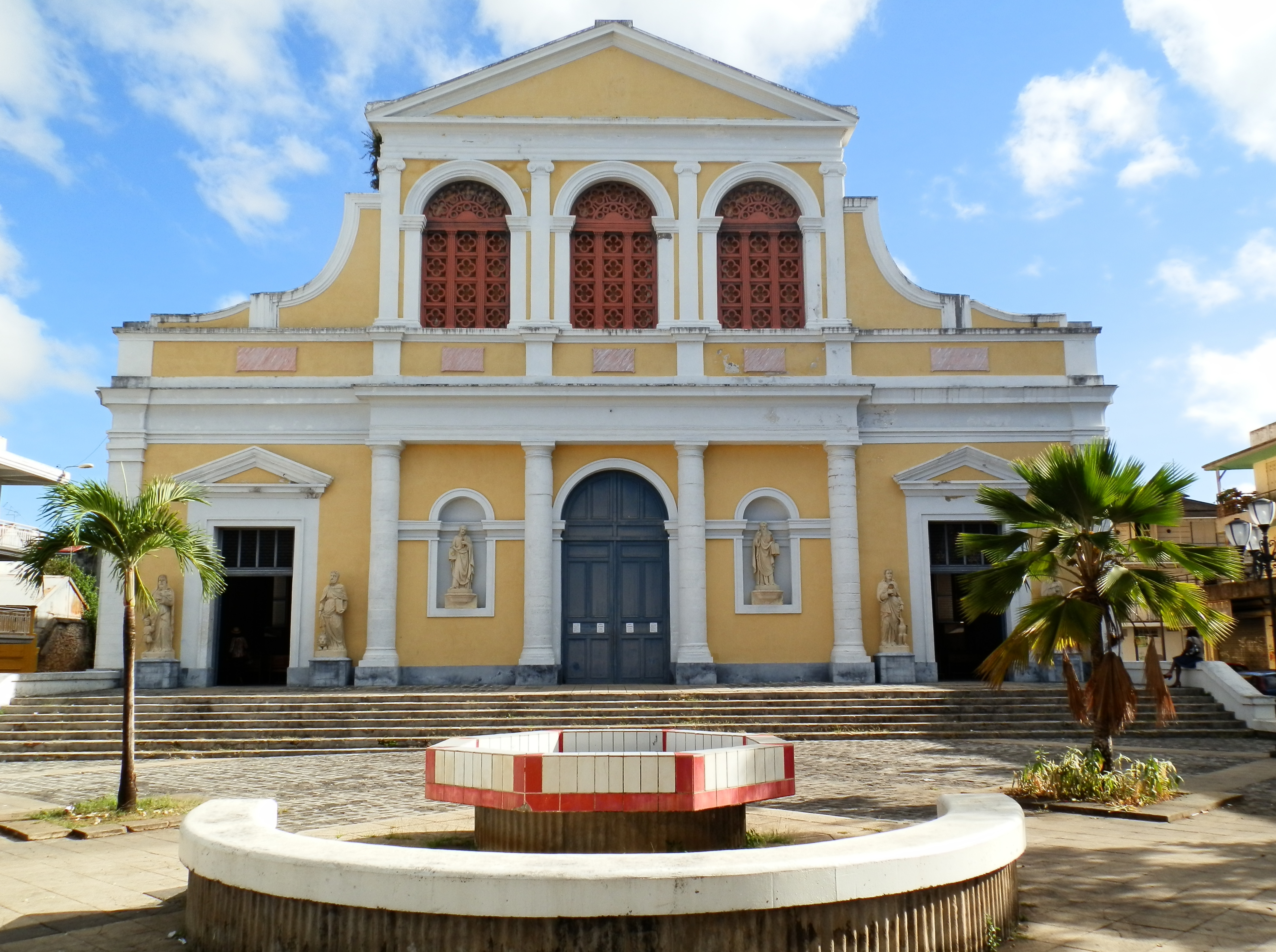 Église Saint-Pierre-et-Saint-Paul, (Classé, 1978) .